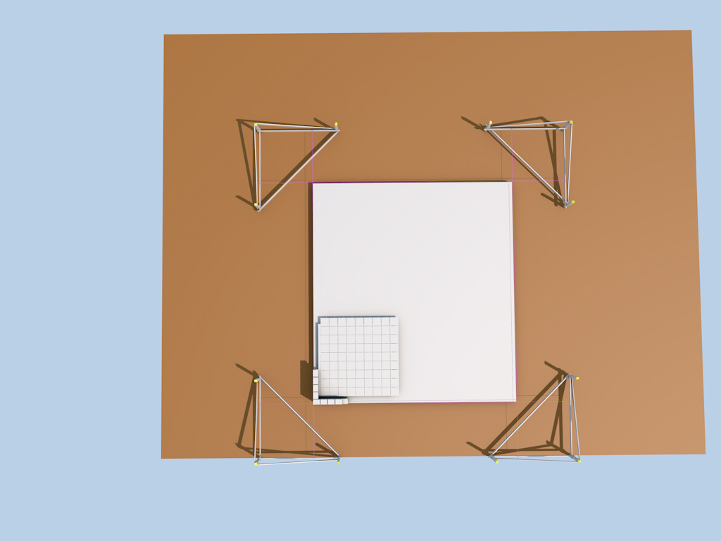 Schnürgerüst CAD